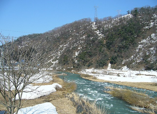 日野川 福井県南条郡ja:南越前町 今庄駅東方